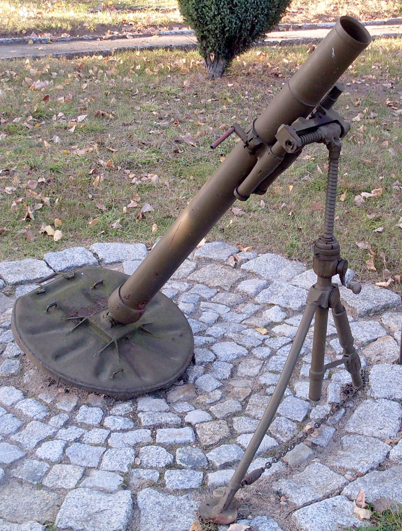 82_mm_moździerz_wz_37